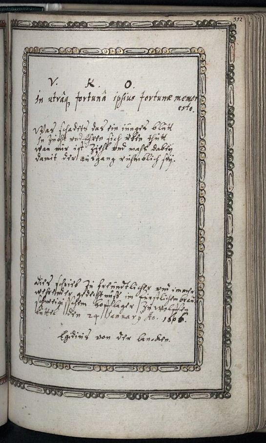 EIntragung von Ägidius von der Lancken im Stambuch des David von Mandelsloh, Wolfenbüttel, 24. Januar 1606